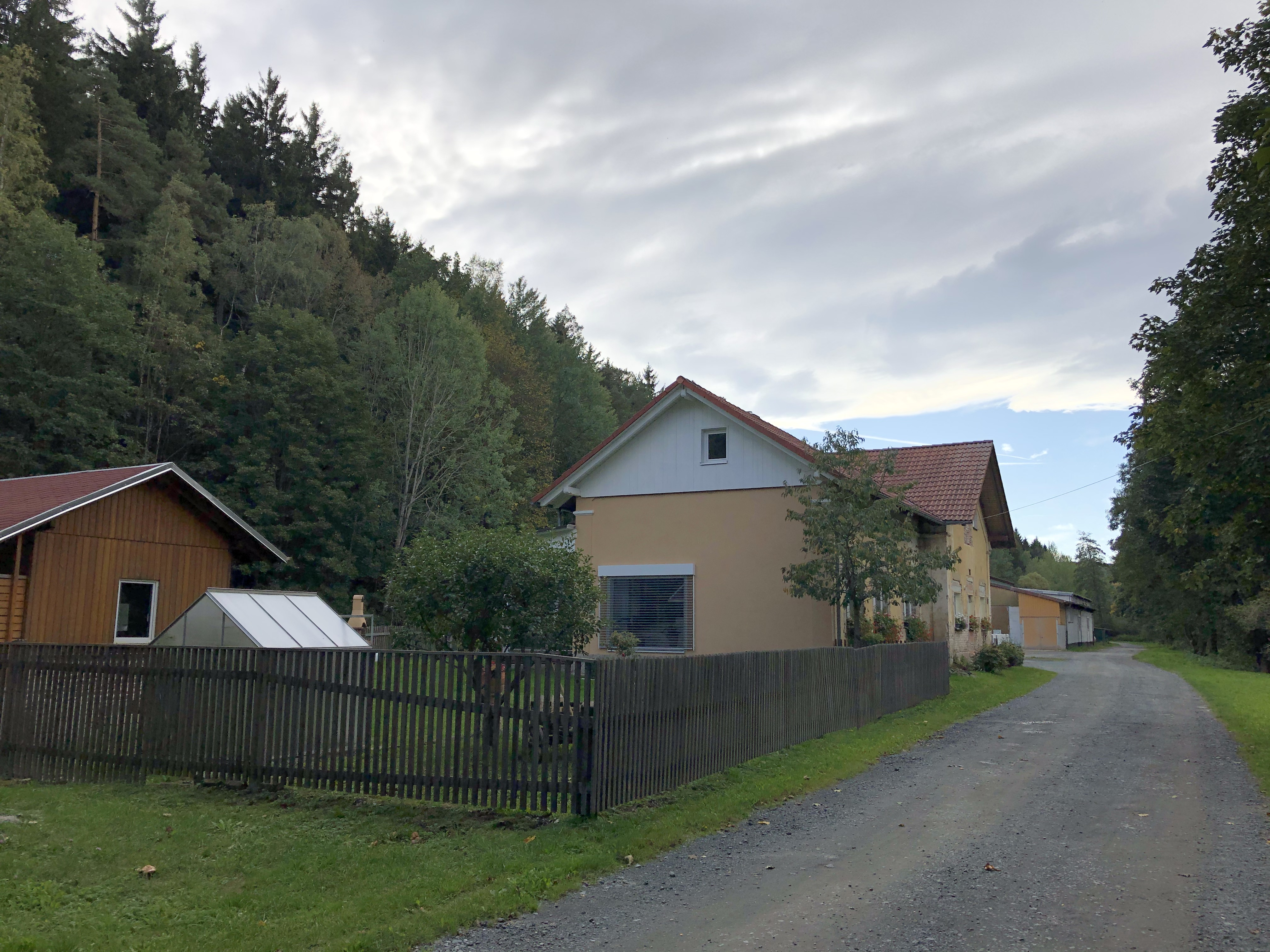 Haltestelle Freiberg (Vogtl) (2019)